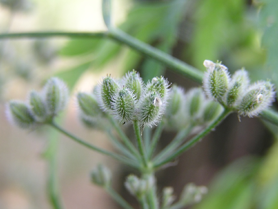 Torilis arvensis auf einer Wiese am Waldrand bei Bad Dürkheim a.d.W. (Deutschland).